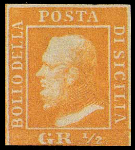 Первая марка Сицилийского королевства